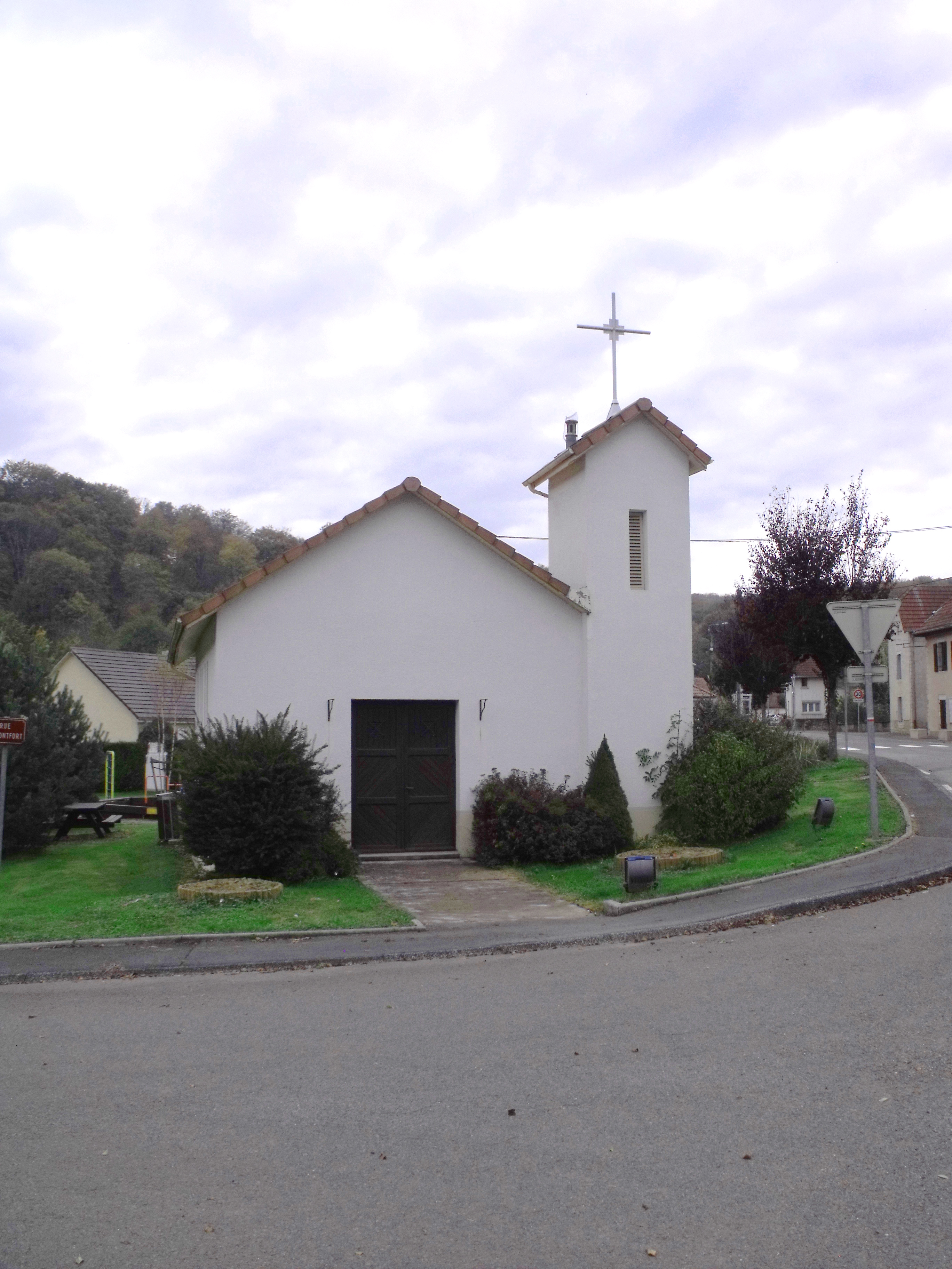 Chapelle à L'Hôpital-Saint-Lieffroy, Doubs, France